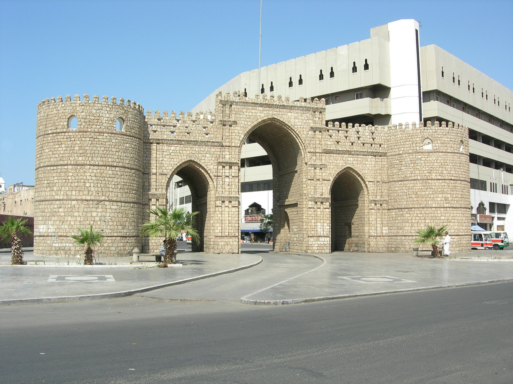 പഴയ ജിദ്ദയിലെ മക്കയിലേക്കുള്ള പ്രവേശന കവാടം (ബാബ് മക്ക)